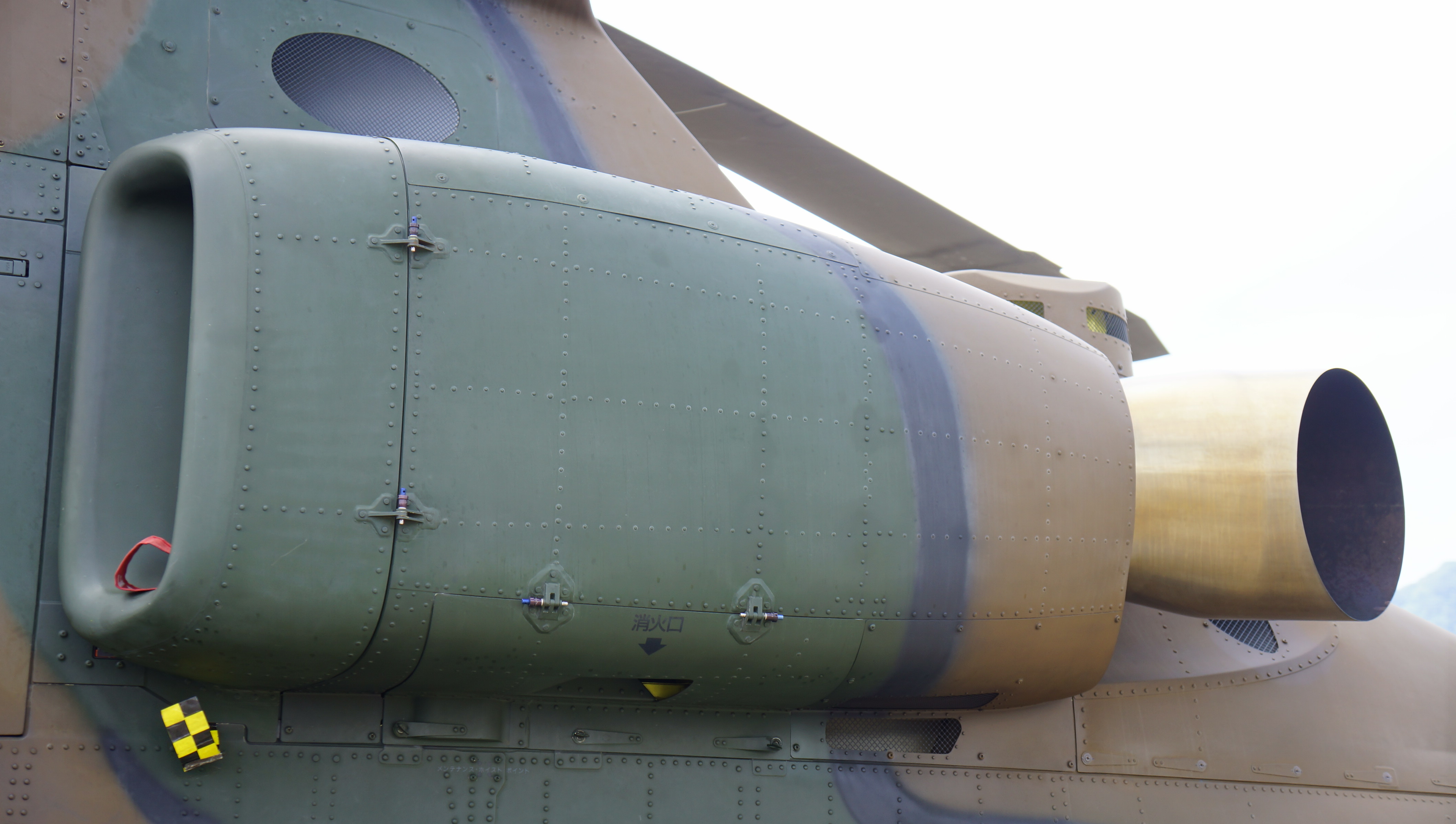 陸上自衛隊 OH-1観測ヘリコプター（32634号機） TS1-M-10Aエンジンカウル。 14年7月27日 海上自衛隊舞鶴航空基地にて。